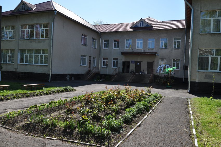 ДНЗ Червона шапочка